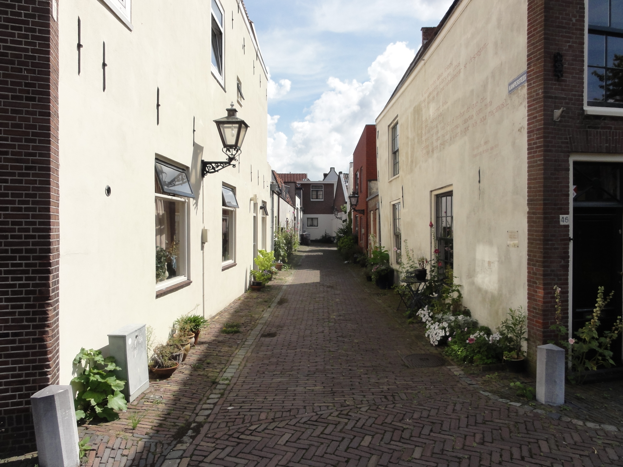 Kampersteeg in Leiden